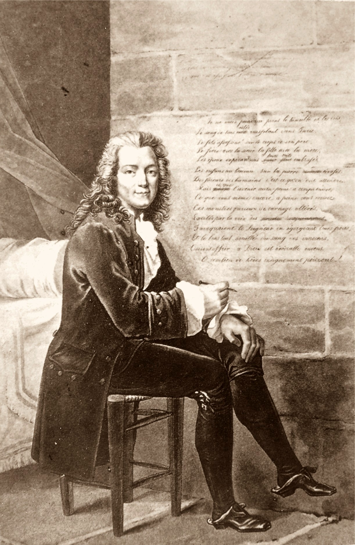 Voltaire - eigentlich François-Marie Arouet 1694-1778 war einer der einflussreichsten Autoren der französischen und europäischen Aufklärung.